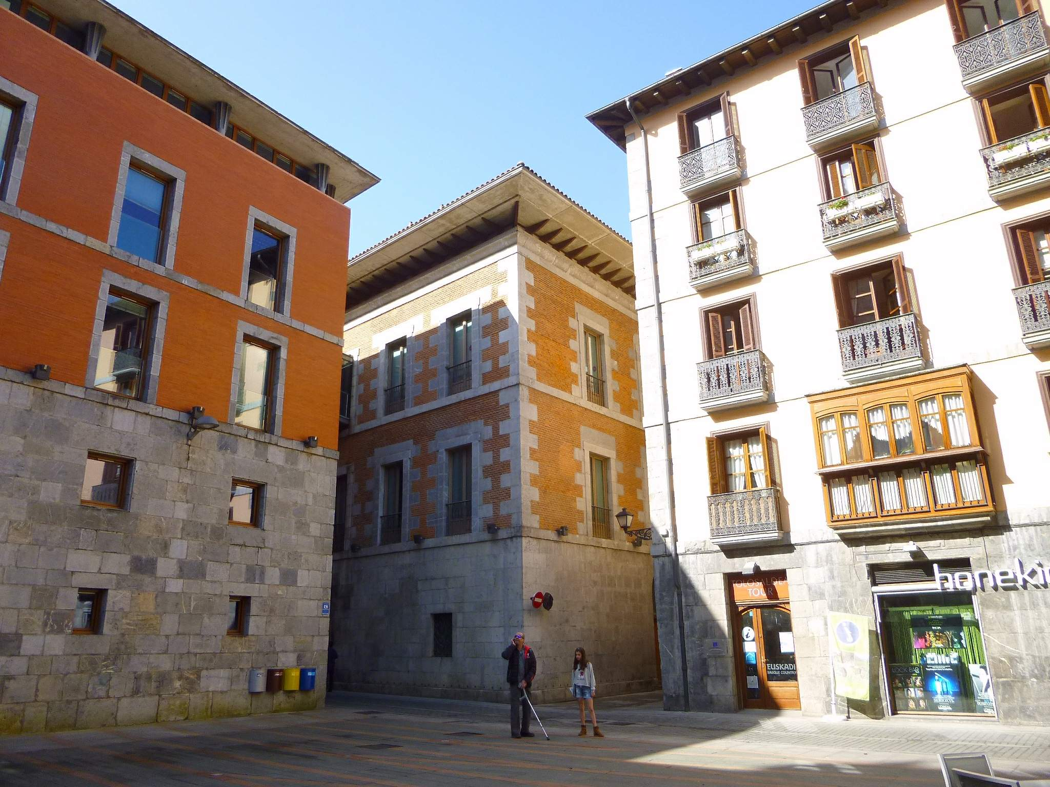 Andre Maria Plaza (Tolosa)